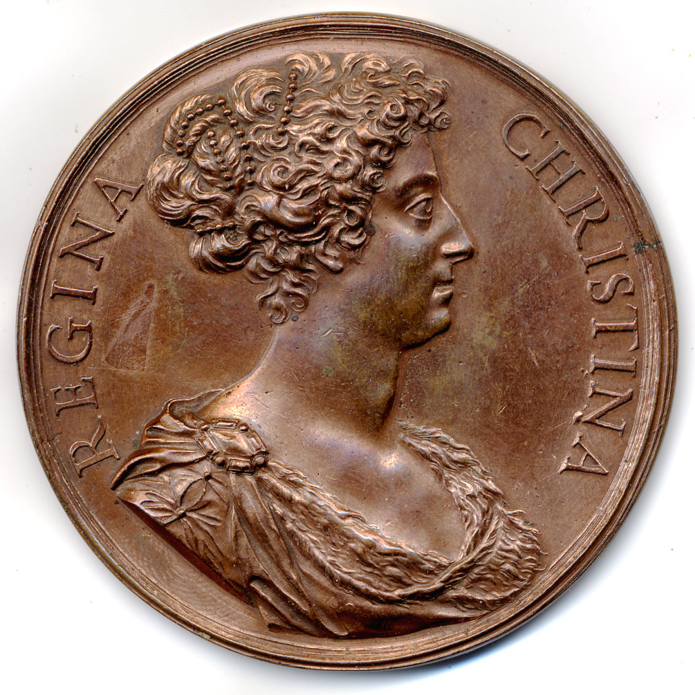 Médaille à l'effigie de Christine de Suède, frappée vers 1680, bronze, 61mm